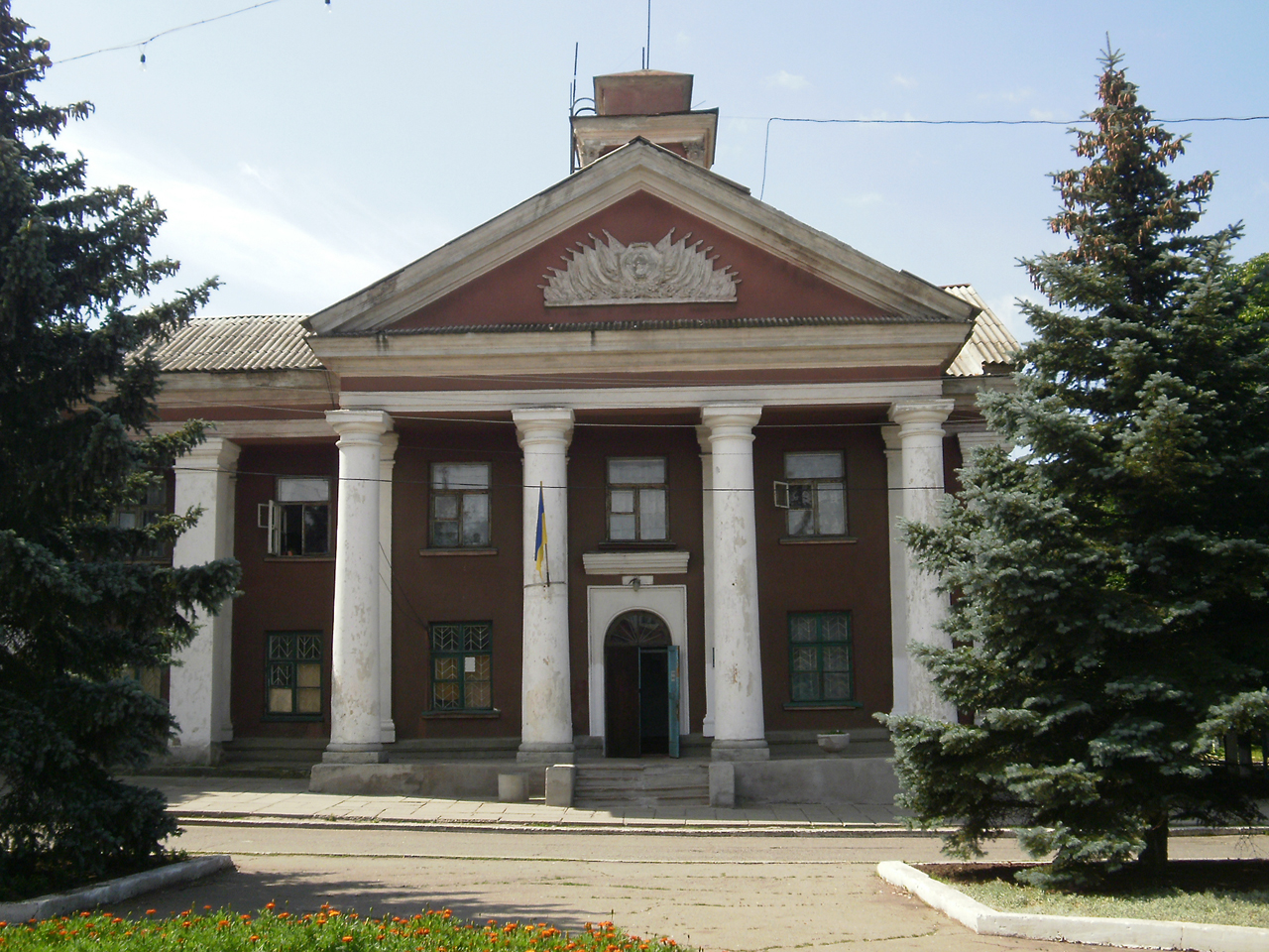 пгт Мироновский Донецкой области